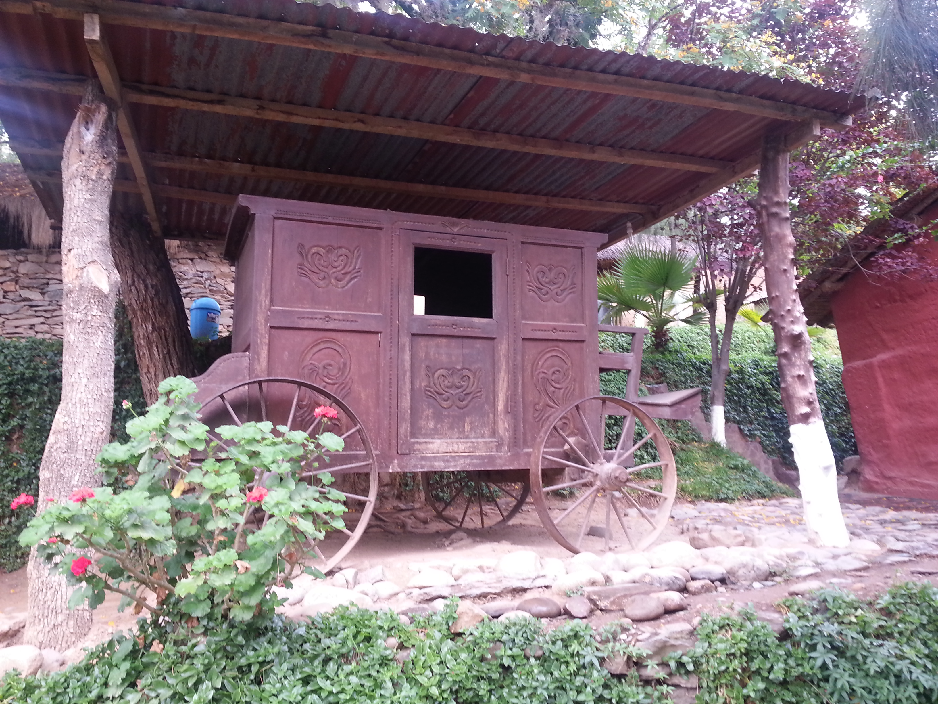 Carruaje antiguo reconstruido traído de Lima. La casa es patrimonio monumental con R.D.N.Nº 246 INC.